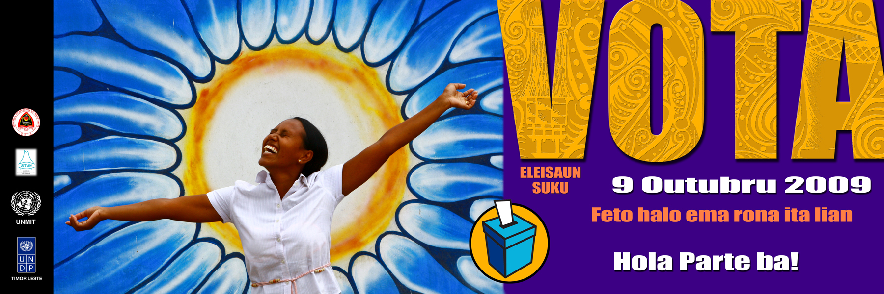 Aufruf zur stärkeren Beteiligung von Frauen an der Kommunalwahl in Osttimor 2009.